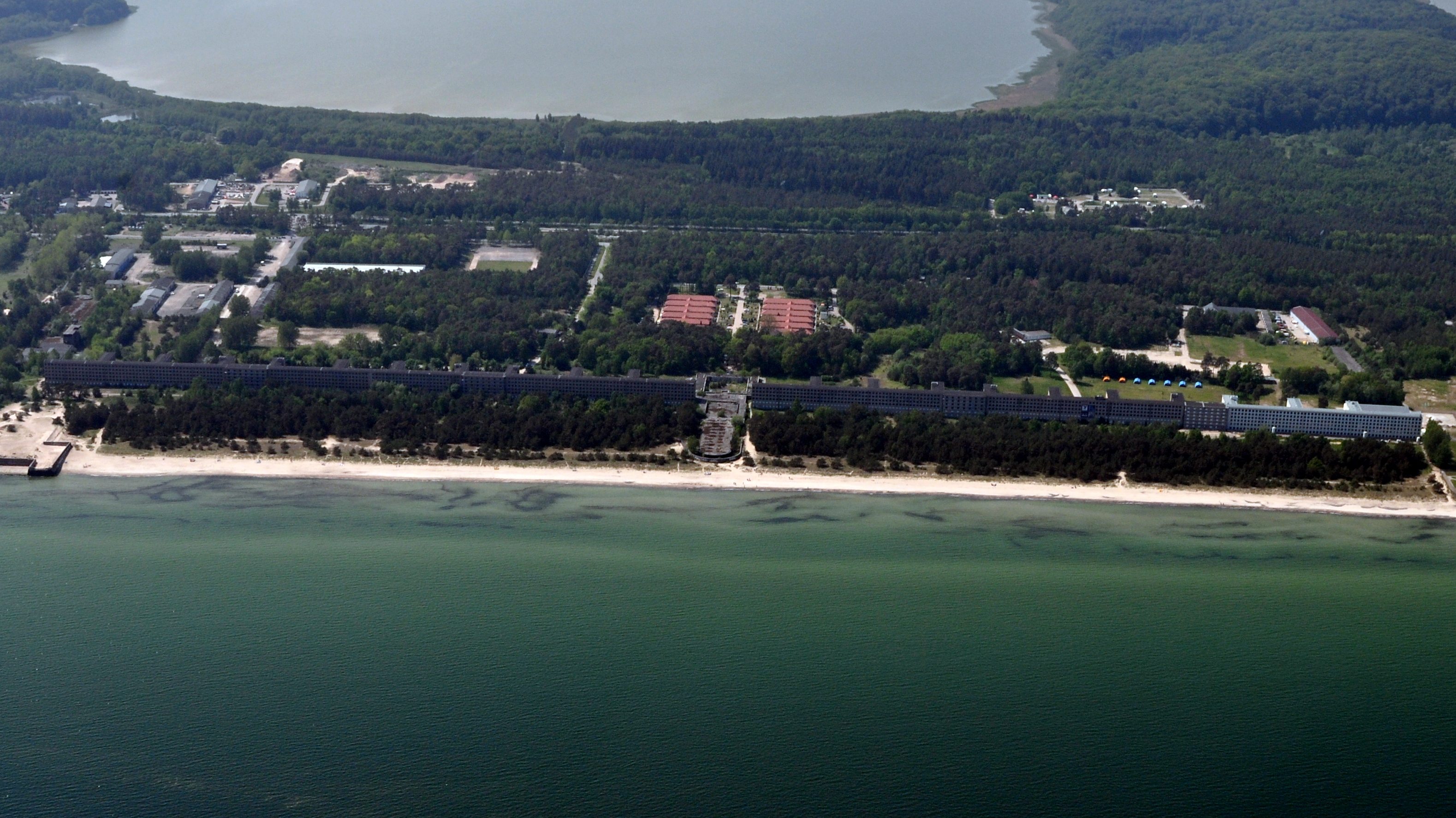 Die Bilder wurden von mir während eines einstündigen Rundflugs ab Flugplatz Güttin am 21. Mai 2011 aufgenommen. Die Bildbeschreibung steht im Dateinamen. Aufgenommen mit einer Nikon D5000 durch das Seitenfenster des Flugzeugs.